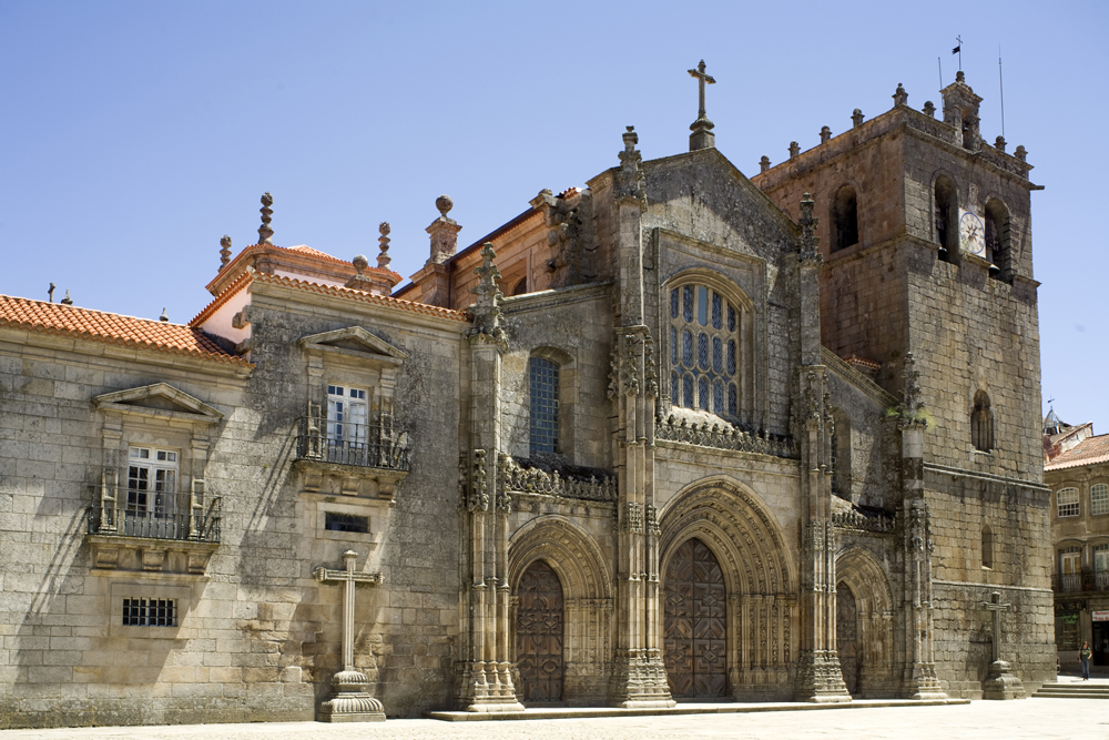 Unidentified Cultural Heritage Portugal